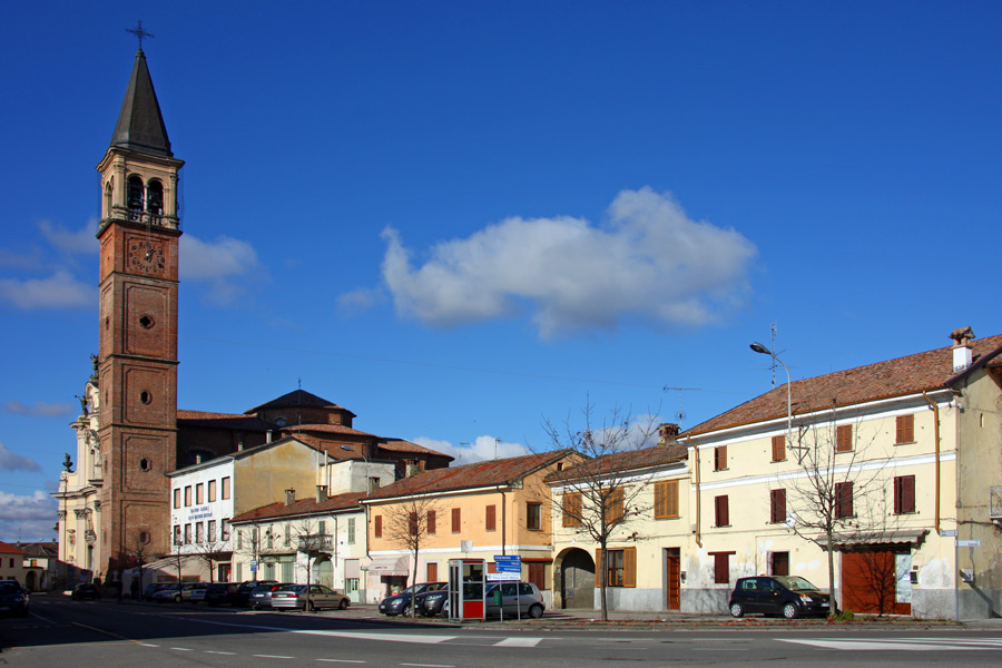 Veduta del centro di Ottobiano (PV) con la chiesa parrocchiale